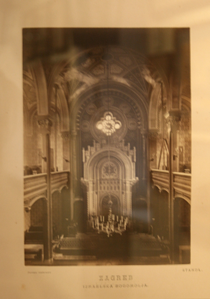 Sinagoga u Praškoj ulici, Ivan Standl, Zagreb 1880. godine, fotografija. Unutrašnjost sinagoge snimljena nakon potresa u Zagrebu. "Ediktom o toleranciji Josipa II iz 1782. godine Židovi stječu pravo boravka u Hrvatskoj pa su se zahvaljujući tome počeli intenzivnije doseljavati u Hrvatsku pa i u Zagreb. Prvi Židov stigao je u Zagreb 1786. godine. Bio je to Jakov Stiegler. Naseljavanje Židova teklo je sporo pa je tek 1806. godine osnovana Židovska općina u Zagrebu, u koju je bilo učlanjeno 75 pripadnika. S postupnim podmlađivanjem i demografskim rastom židovske zajednice 1838. godine općina je zabilježila već oko 300 članova. Prilagođeni novom okružju, već polovinom 19. stoljeća, Židovi su prigrlili hrvatsku sredinu i suživjeli se s njome. Javlja se potreba za gradnjom reprezentativne sinagoge, jer su do tada zagrebački Židovi imali bogomolje u kućama. Godine 1862. Izraelitska bogoštovna općina predlaže Gradskom poglavarstvu lokaciju za sinagogu u neposrednoj blizini glavnoga gradskog središta. Općina u molbi naglašava spremnost da sudjeluje u uređenju novog središta grada, jer želi sagraditi Božji hram... lijep, velik i krasan, tako da bi doista ukrasivao i sam grad Zagreb. Općina je naručila projekt od istaknutog zagrebačkog arhitekta Franje Kleina. Izgradnja je započela u ljetu 1866., a hram je posvećen godinu dana kasnije. Sinagoga je prvo reprezentativno zdanje u budućem Donjemu gradu, a njezina lokacija pokazuje kako je židovska zajednica bila prihvaćena i cijenjena u životu Zagreba. Srušena je potkraj 1941. godine." Izvor: Muzej grada Zagreba